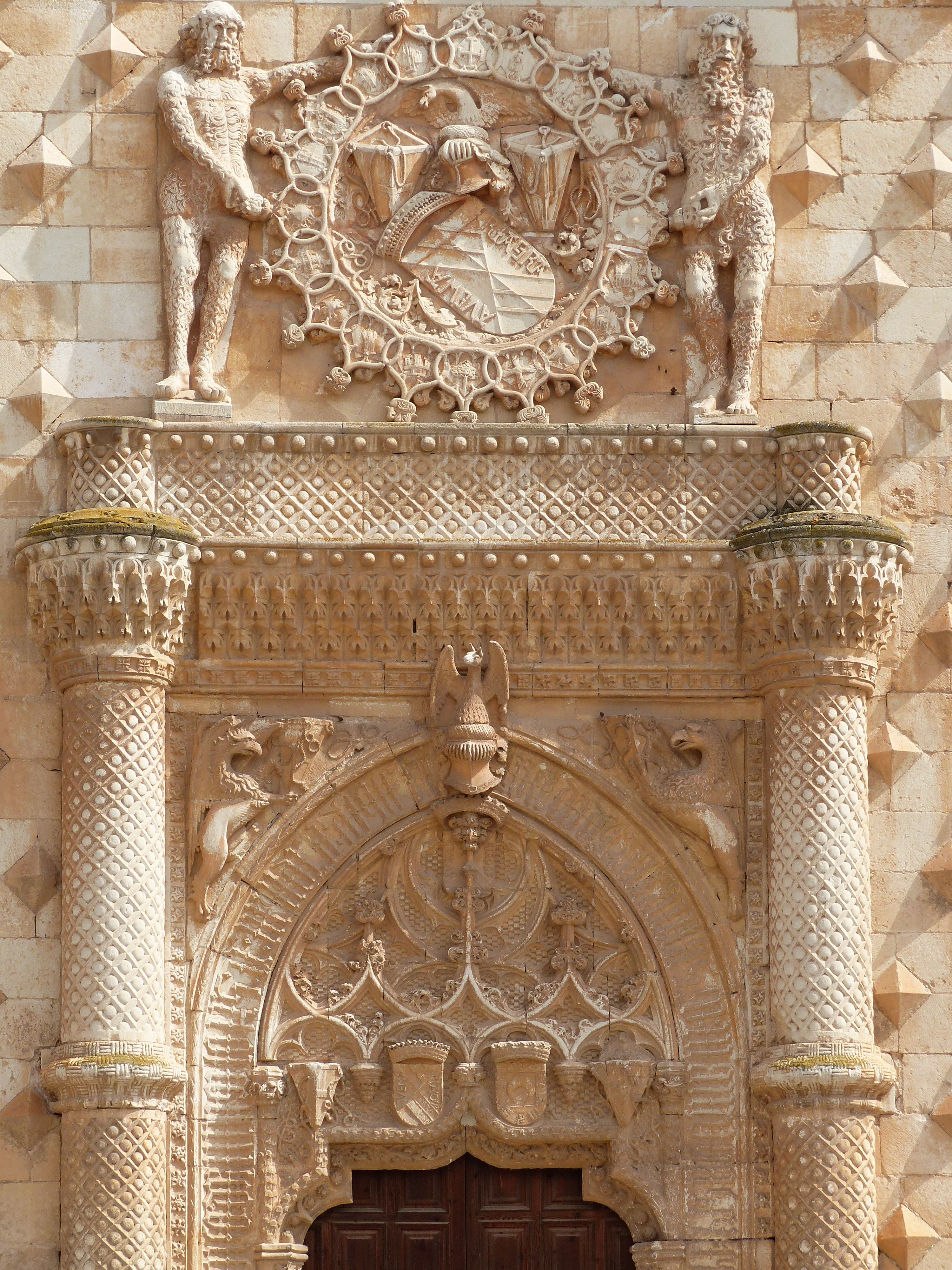 Palacio del Infantado, Guadalajara, España